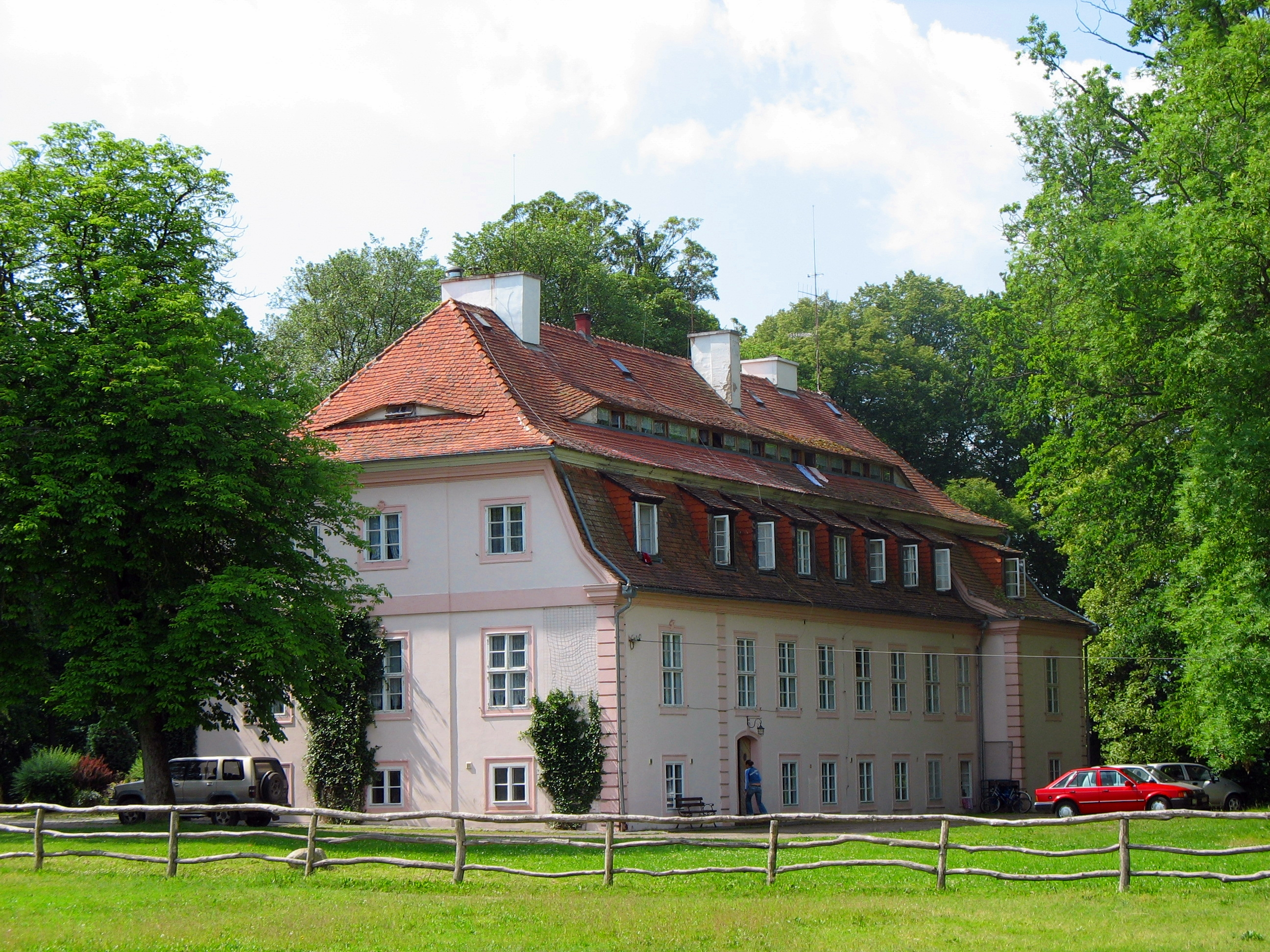 Stare Resko, dwór, XIX